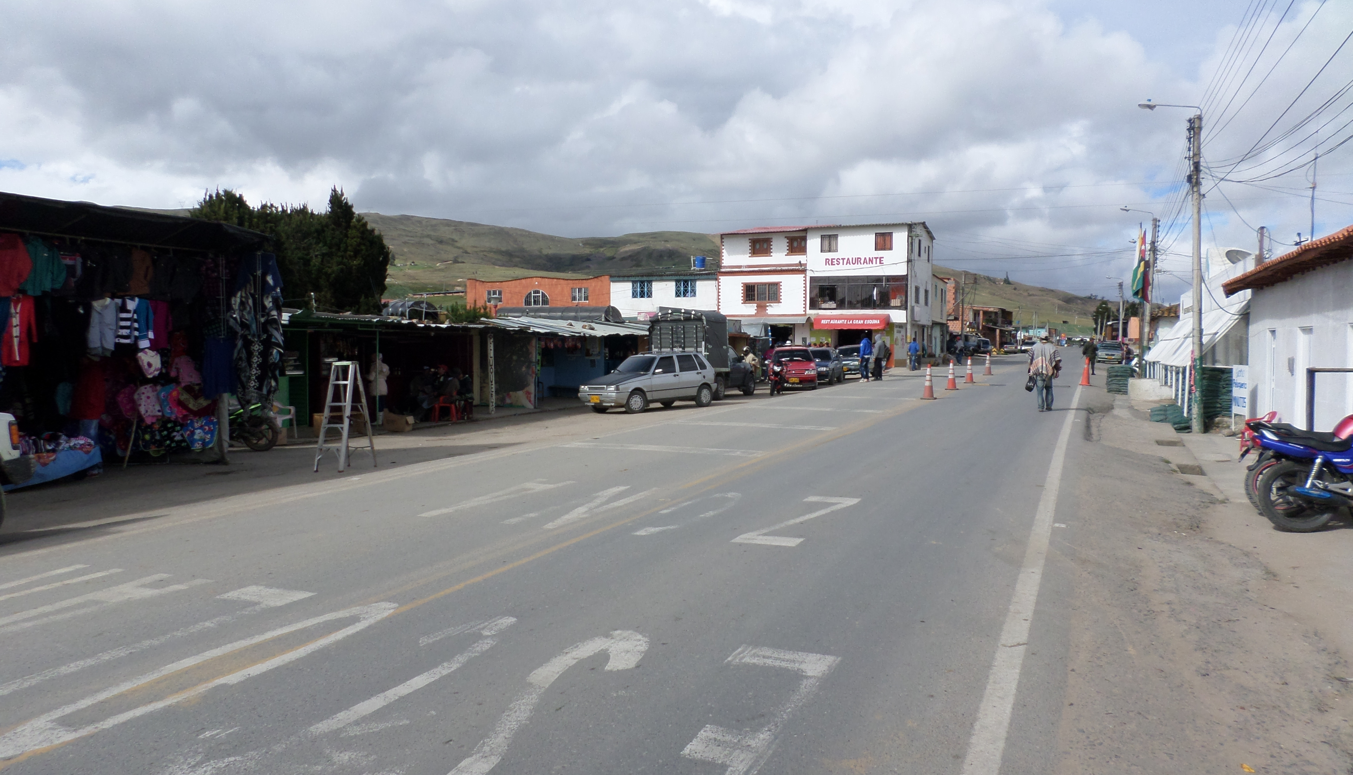 vias